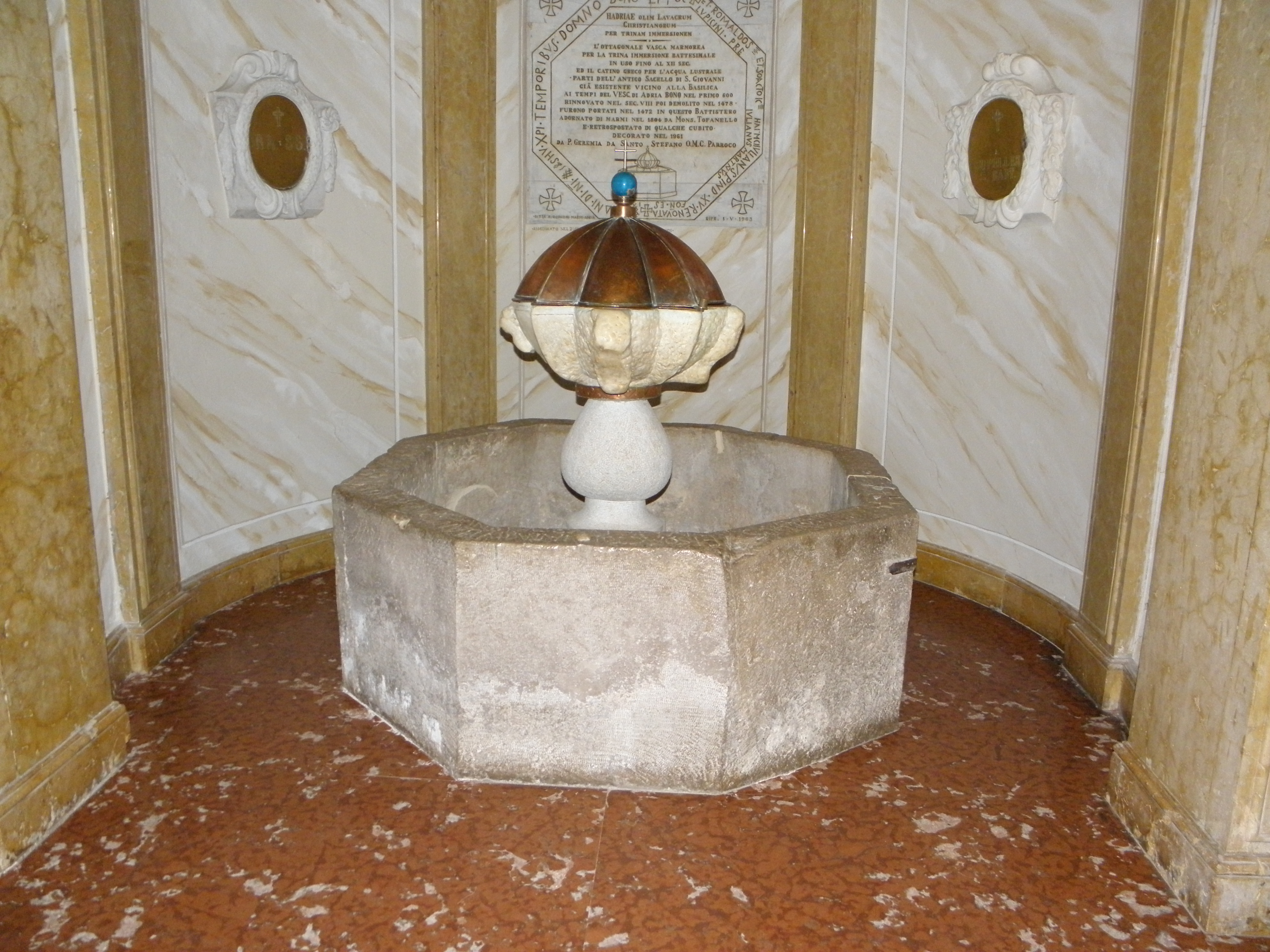 Adria: chiesa di Santa Maria Assunta, detta della Tomba; interno, il fonte battesimale.